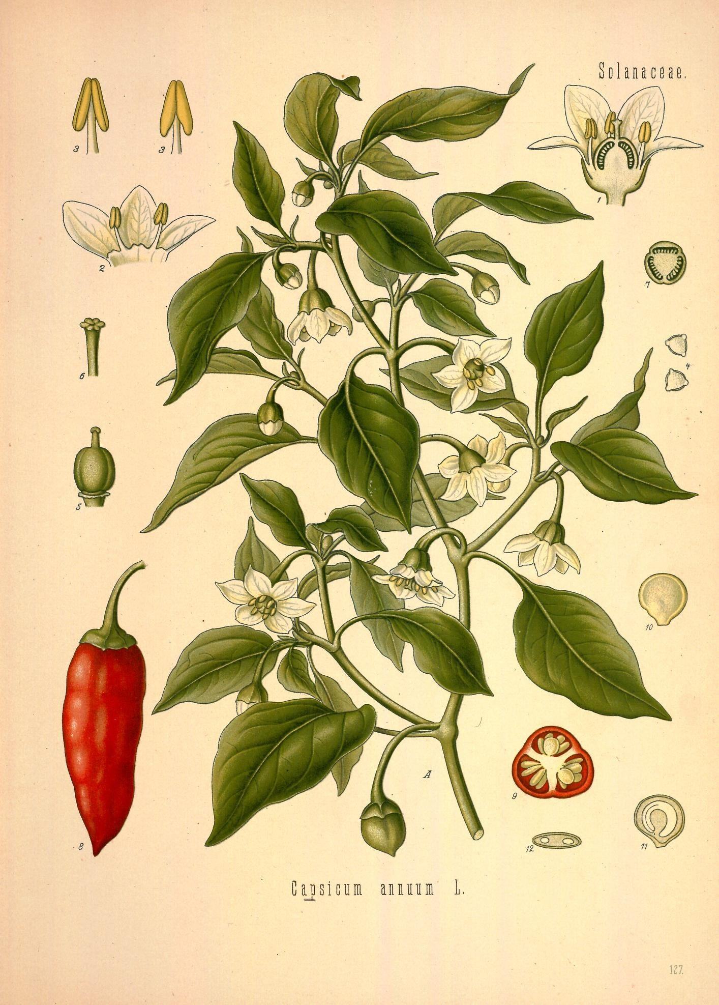 Spanischer Pfeffer. A Theil der blühenden Pflanze, natürl. Grösse; 1 Blüthe im Längsschnitt, vergrössert; 2 aufgeschnittene Krone mit Staubgefässen, desgl.; 3 Staubgefäss, desgl.; 4 Pollen, desgl.; 5 Stempel, desgl.; 6 Griffel und Narbe, desgl.; 7 Fruchtknoten im Querschnitt, desgl.; 8 Frucht, nat. Grösse; 9 dieselbe im Querschnitt, desgl.; 10 Same, vergrössert; 11 u. 12 derselbe im Längs- und Querschnit.